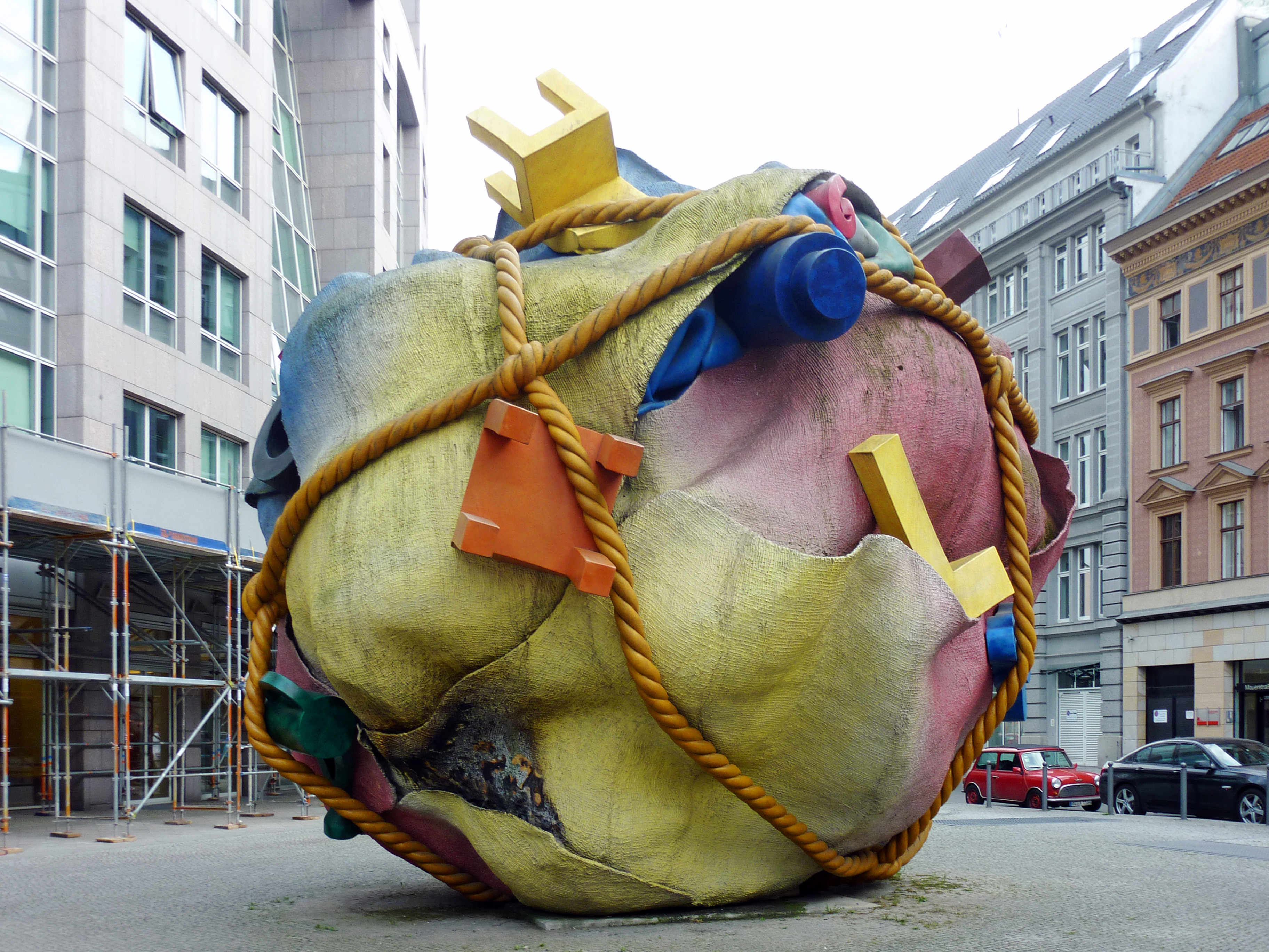 Skulptur 'Houseball' von Claes Oldenburg und Coosje van Bruggen auf dem Bethlehemkirchplatz in Berlin-Mitte. Blickrichtung Süd.